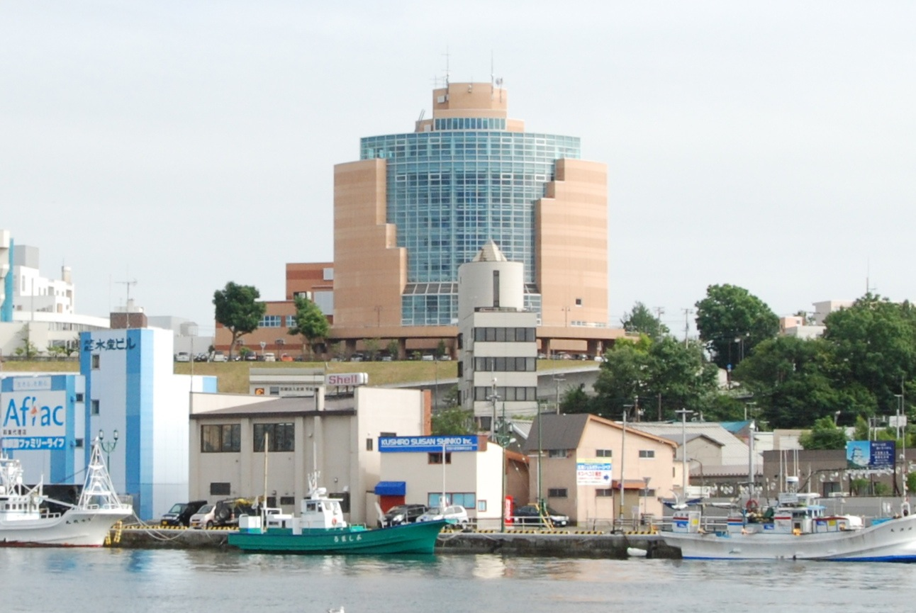 Moo側岸壁より撮影 Nikon D80 + AF-S VR Zoom-Nikkor 24-120mm f/3.5-5.6G IF-ED